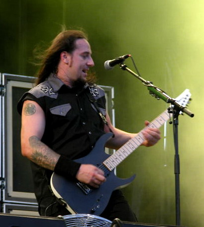 Molnár Levente (Cseresznye) a Tankcsapda koncertjén, Sziget Nagyszínpad